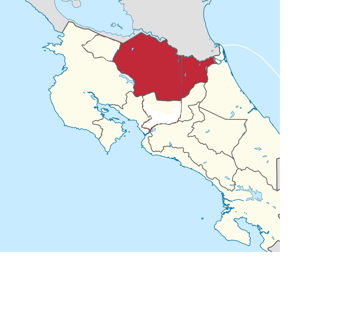 Mapa de la Región Huetar Norte